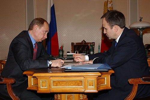 НОВО-ОГАРЕВО. Рабочая встреча с исполняющим обязанности губернатора Пермской области Олегом Чиркуновым.